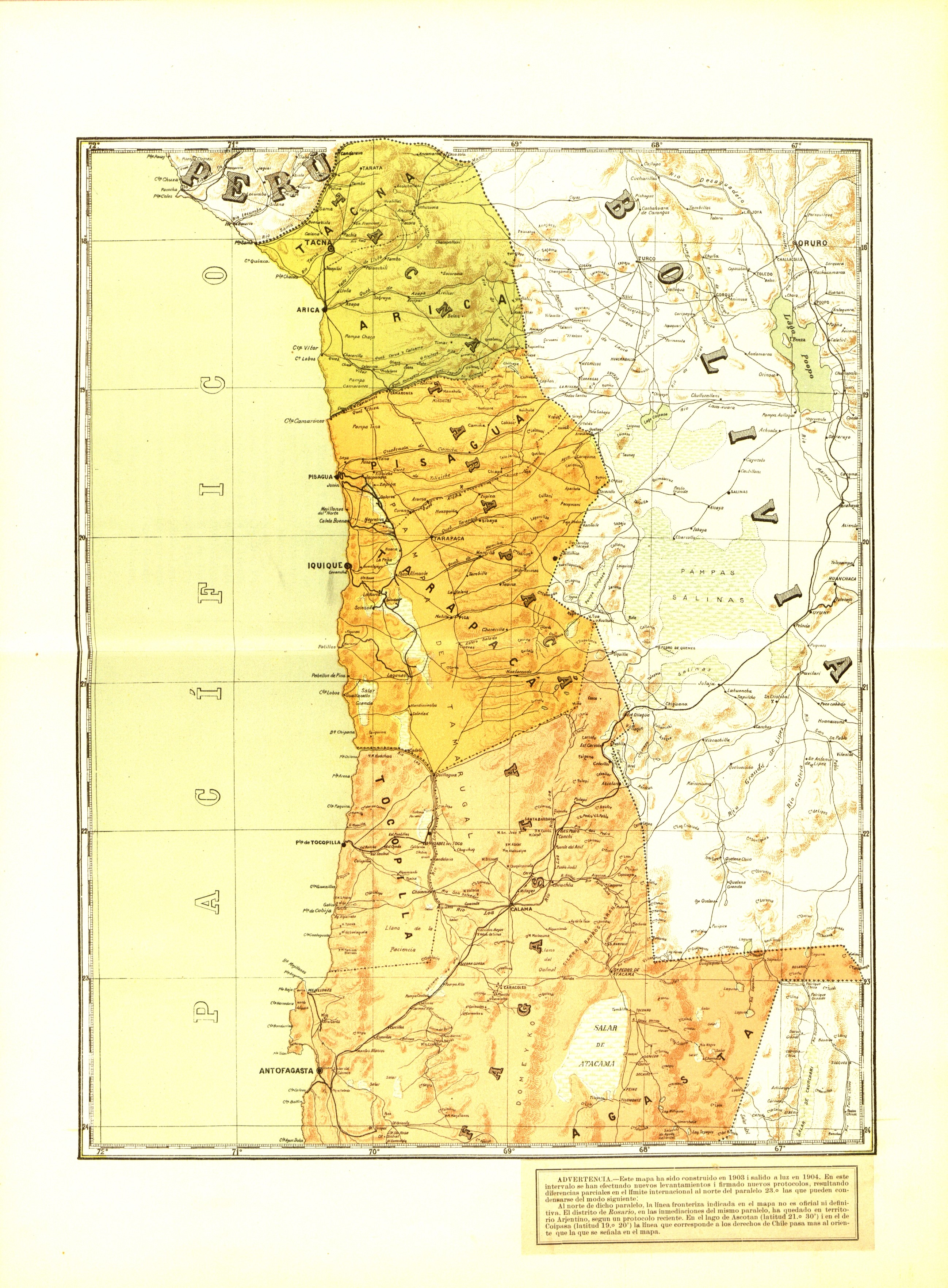 Mapa de Chile 1904 publicada por Carlos Tornero en Chile descripción física, política, social industrial y comercial de la república de Chile